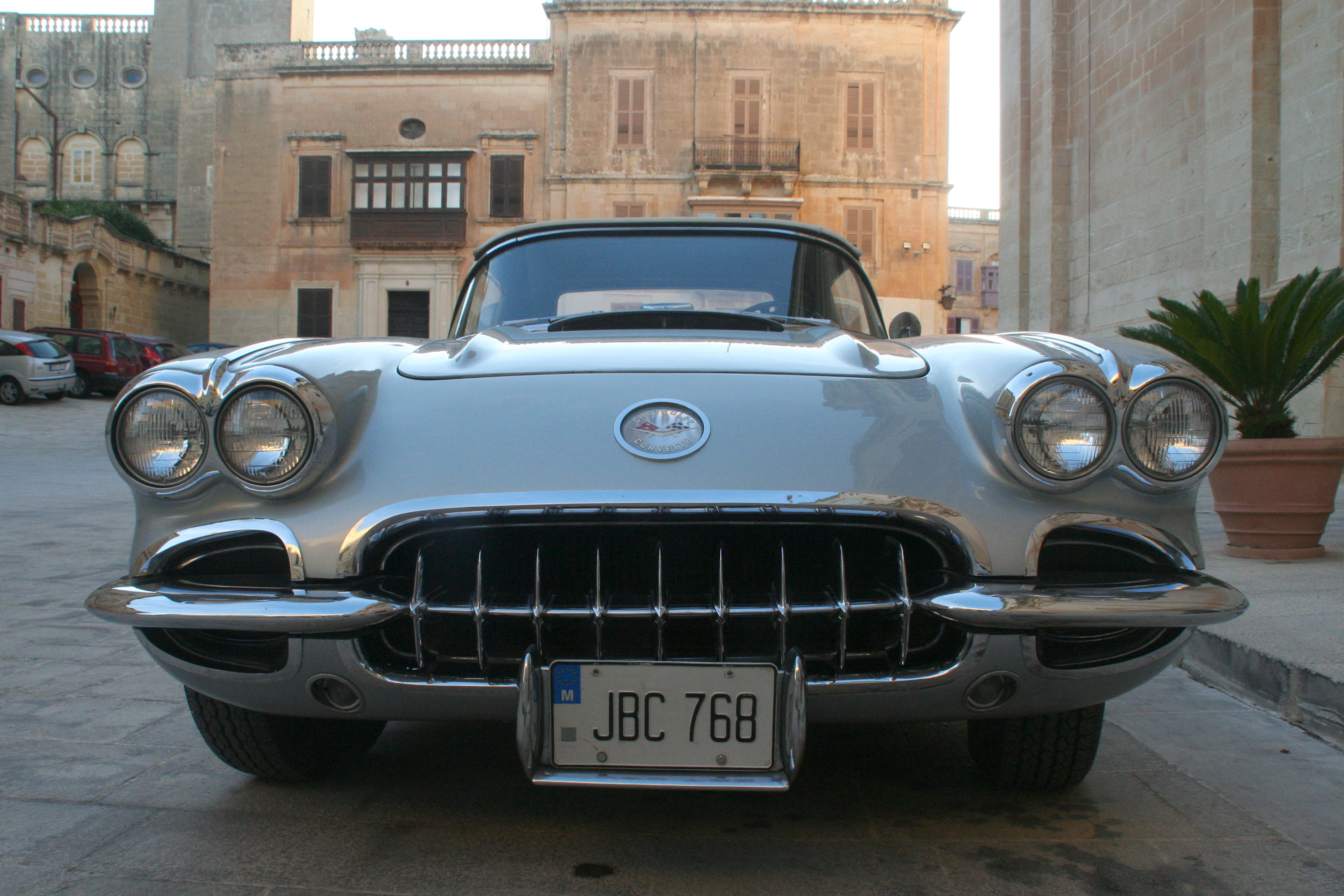 Chevrolet Corvette immatriculée à Malte avec des plaques au format américain